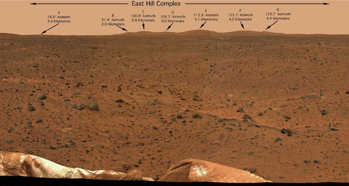 Gusev-Krater, Mars (East Hill Complex), Landestelle Spirit (MER-A)